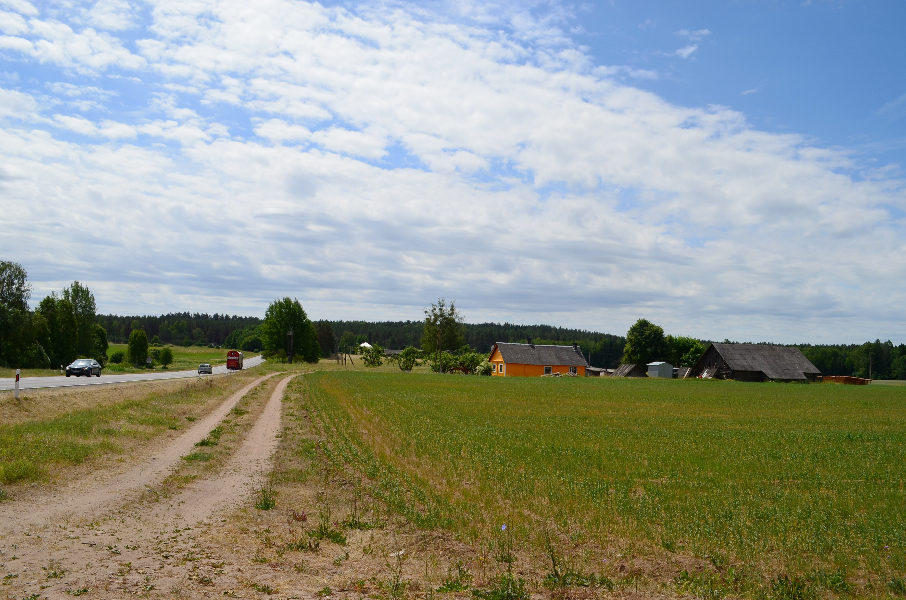 Noruliai, Varėnos raj.